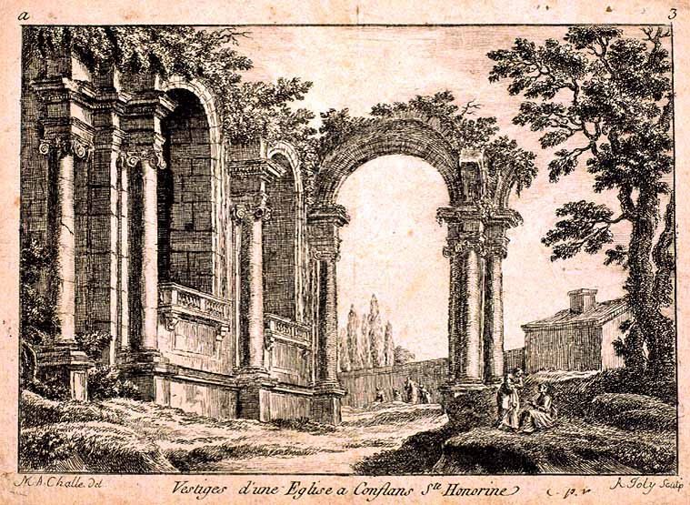 "Vestiges d'une église à Conflans-Sainte-Honorine", gravure, milieu XVIIIe siècle, d'après un dessin de Michel-Ange Challe. L'on voit l'ébauche du nouveau chœur Renaissance, entamé vers 1551, devant le chevet de l'église, dans l'actuel jardin du presbytère. Les vestiges auraient été démolies après la Révolution française.